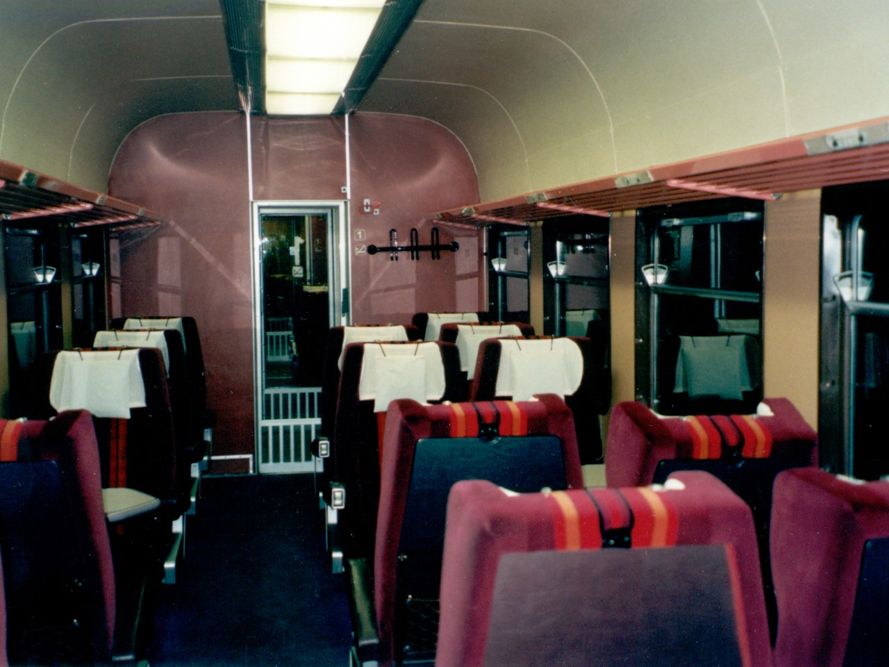 Inneneinrichtung eines Steuerwagens des Bauart Azf 209 am 06.05.1998